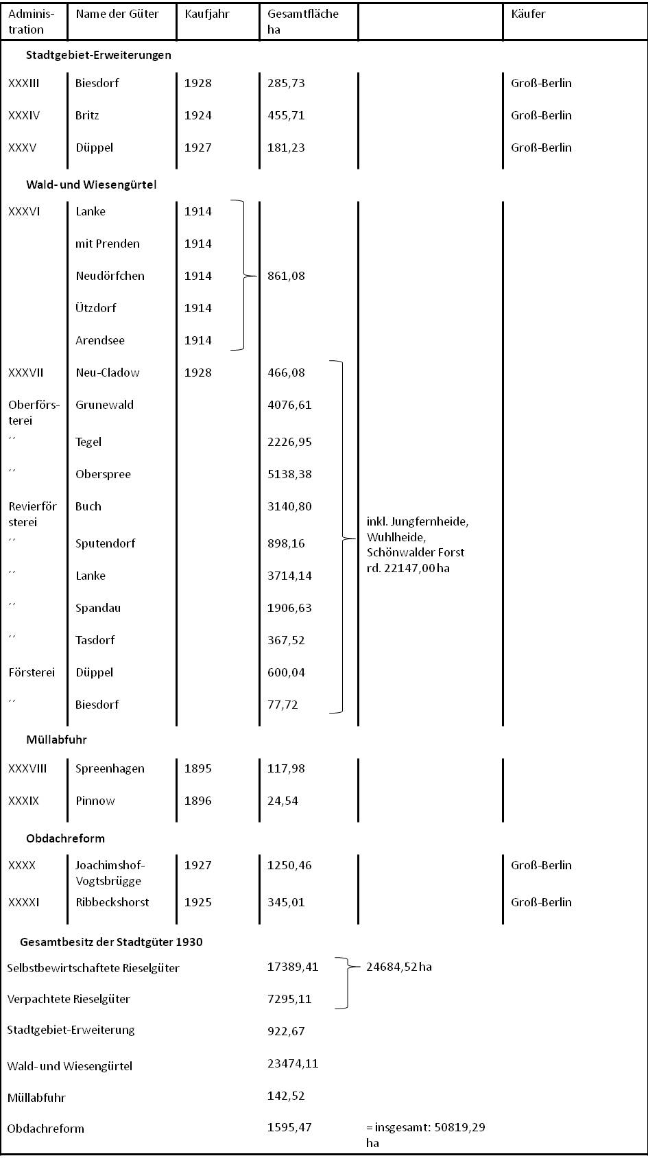 Die Tabelle zeigt den Besitz der Stadt Berlin 1928, der nicht landwirtschaftlich genutzt wurde, sondern als Siedlungsgebiet, Grünfläche oder für die Müllabfuhr gekauft worden waren.